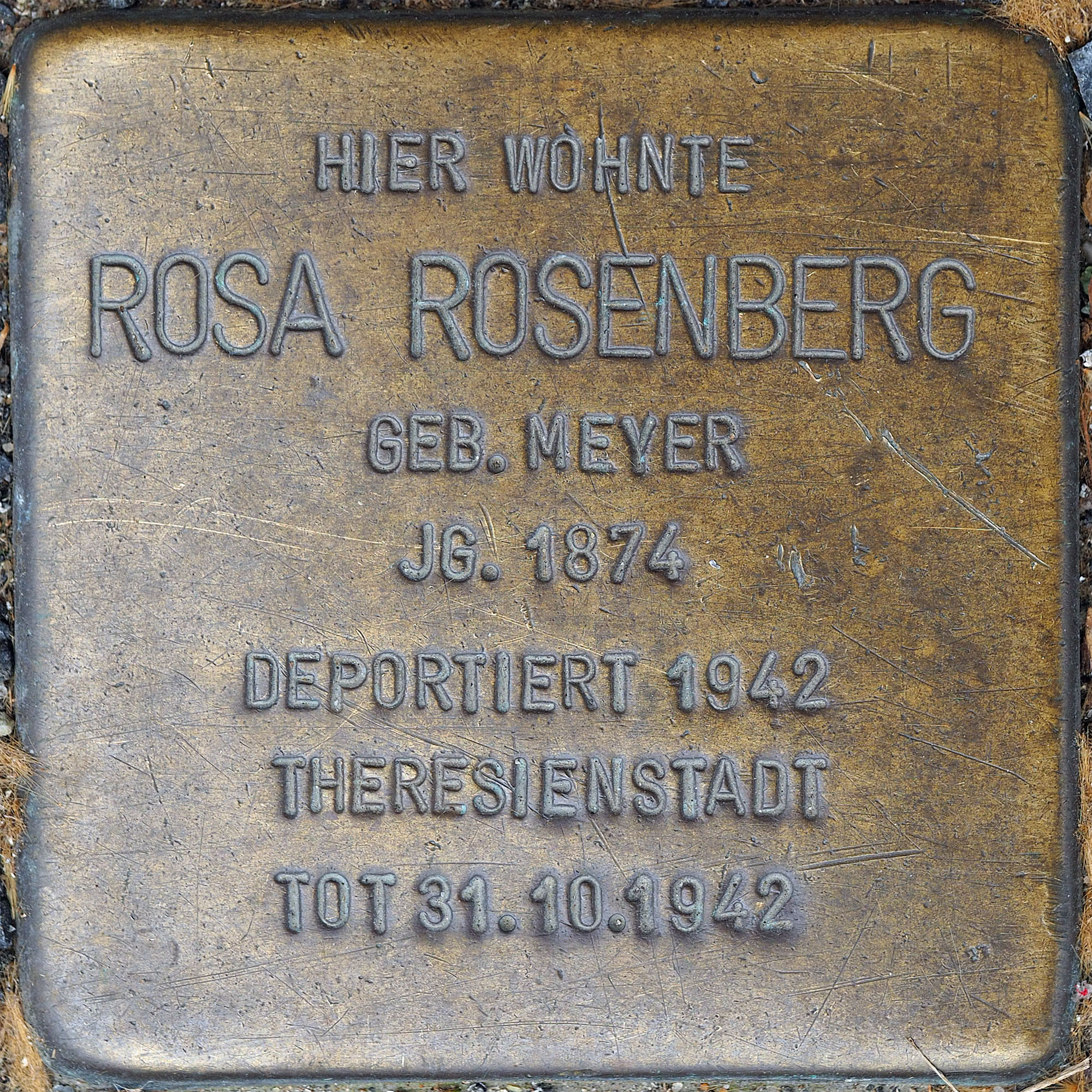 Stolpersteine MG: Rosenberg, Rosa